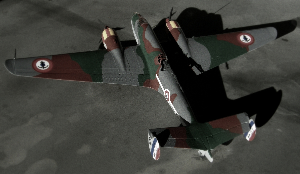 lioré et olivier 451 Heller/Směr 1/72 scale model kit